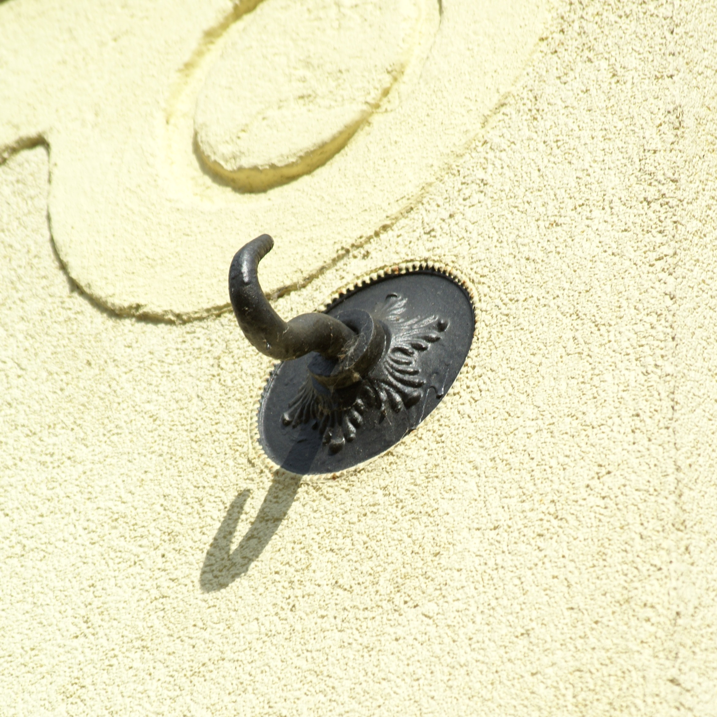 Noch existierender Oberleitungshaken (in Königstein) der 4 km langen Oberleitungsbus-Versuchsstrecke (Königstein–Hütten–Königsbrunn). Diese wurde vom Dresdener Ingenieur Max Schiemann (1866–1933) in der Bielatalstraße errichtet und in der Zeit von 1901 bis 1904 hier betrieben. Die Anlage wurde dann nach Wurzen (Sachsen) verbracht.